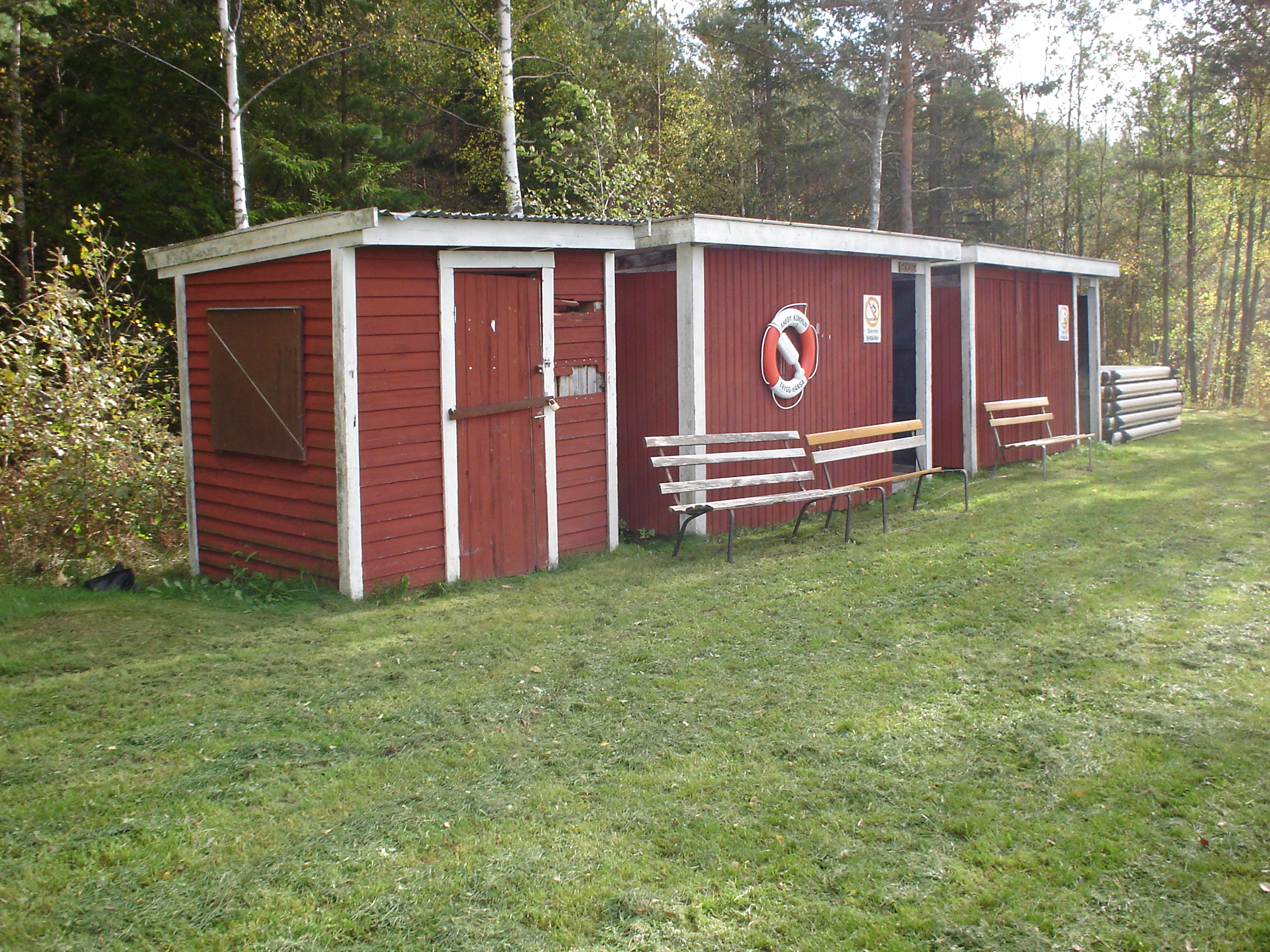 Omklädningshytterna vid den lilla sjön Söljen, med den upptagna bryggan i det högra hörnet av bilden.